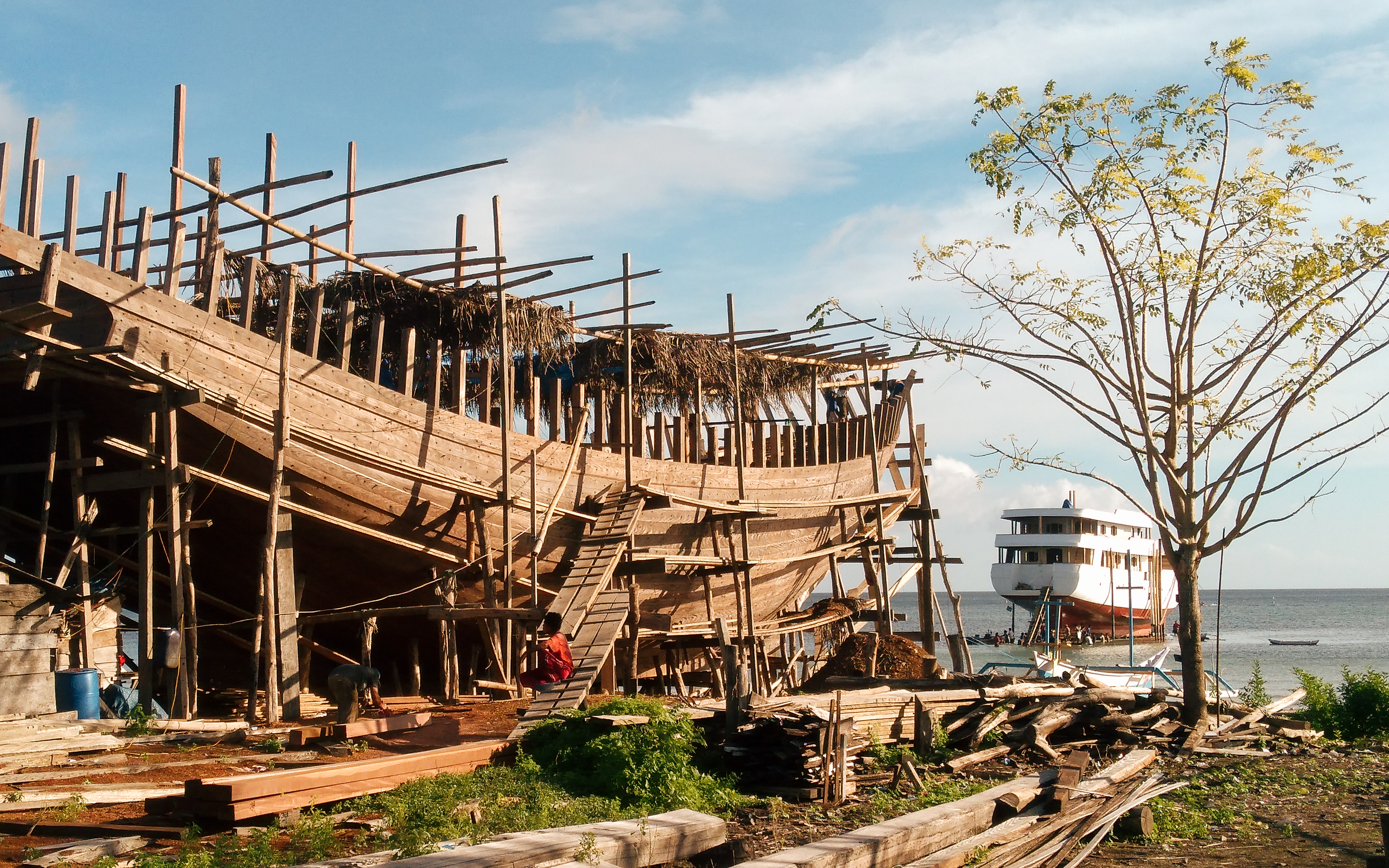 Kapal Pinisi berlabuh meninggalkan bengkel tempat ia dibangun. Lokasi : Pesisir Tanaberu, Bulukumba, Sulawesi Selatan.